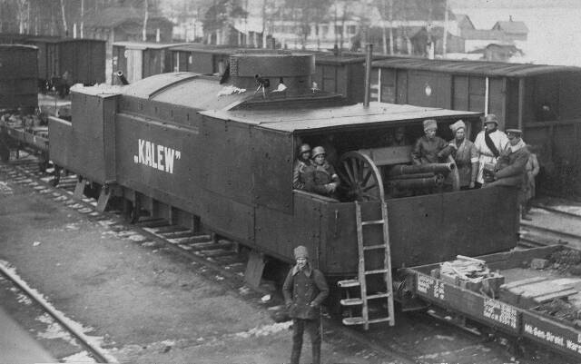 Laiarööpmelise soomusrongi nr 2 suurtükivagun "Kalev" Vabadussõjas